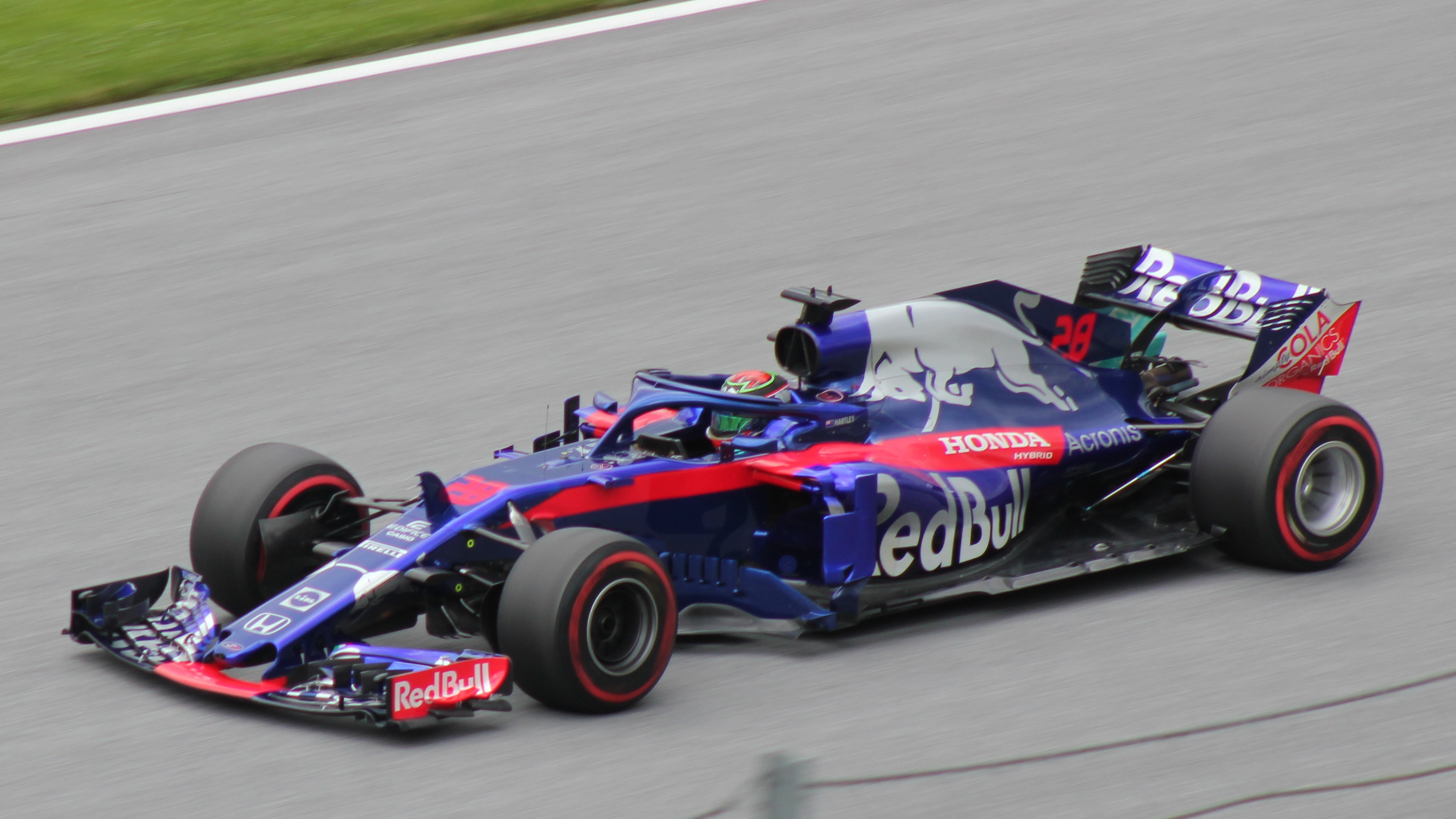 28 Hartley beim Rennwochenende in Österreich 2018